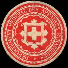 Sealing stamp Title: Departement Federal des Affaires Etrangeres Description: rot, weiß, geprägt Place: Bern/Schweiz size: 4 cm